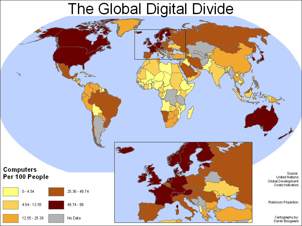 Diese Weltkarte zeigt die weltweite Digitalisierung anhand der Bemessung von einem Computer pro 100 Menschen an einem unbestimmten Zeitpunkt. Der Titel “The Global Digital Divide” lässt sich mit “Der weltweite digitale Graben”, “Die weltweite digitale Kluft” oder “Die weltweite digitale Spaltung” übersetzen.